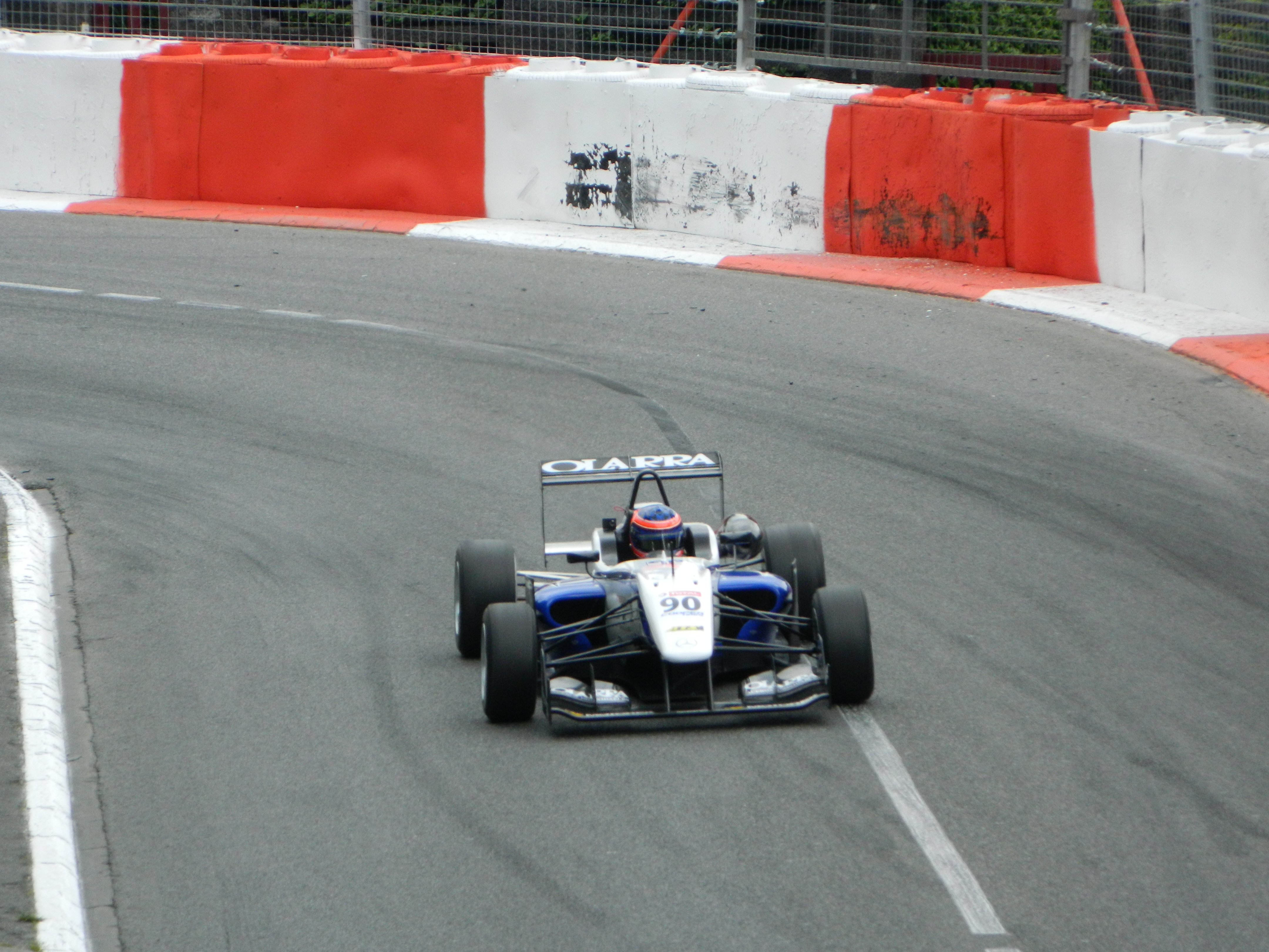 Andrea Roda sur Formule 3 lors du Grand Prix de Pau 2012.